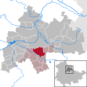 Schloßvippach in Thuringia - District Sömmerda